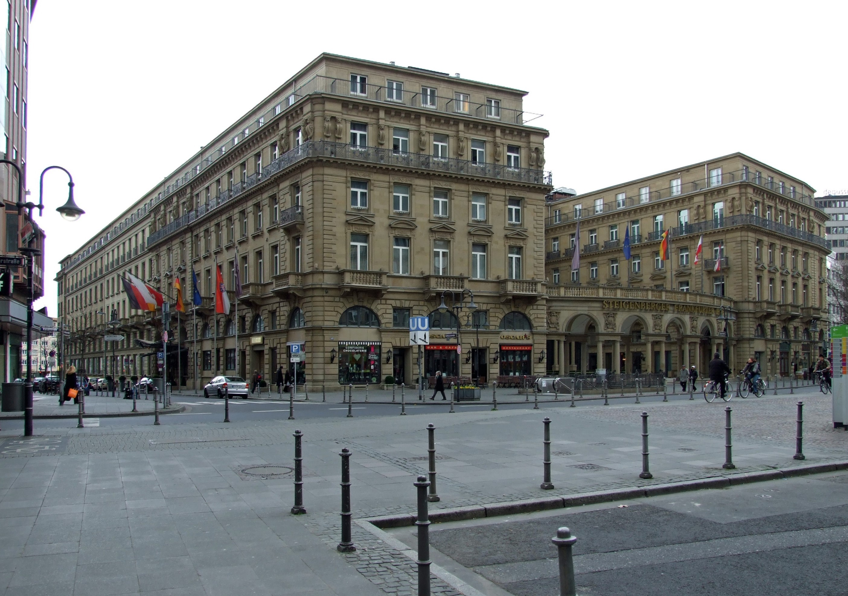 Das Hotel „Frankfurter Hof“, an der Kaiserstrasse am „Kaiserplatz“ in Frankfurt am Main